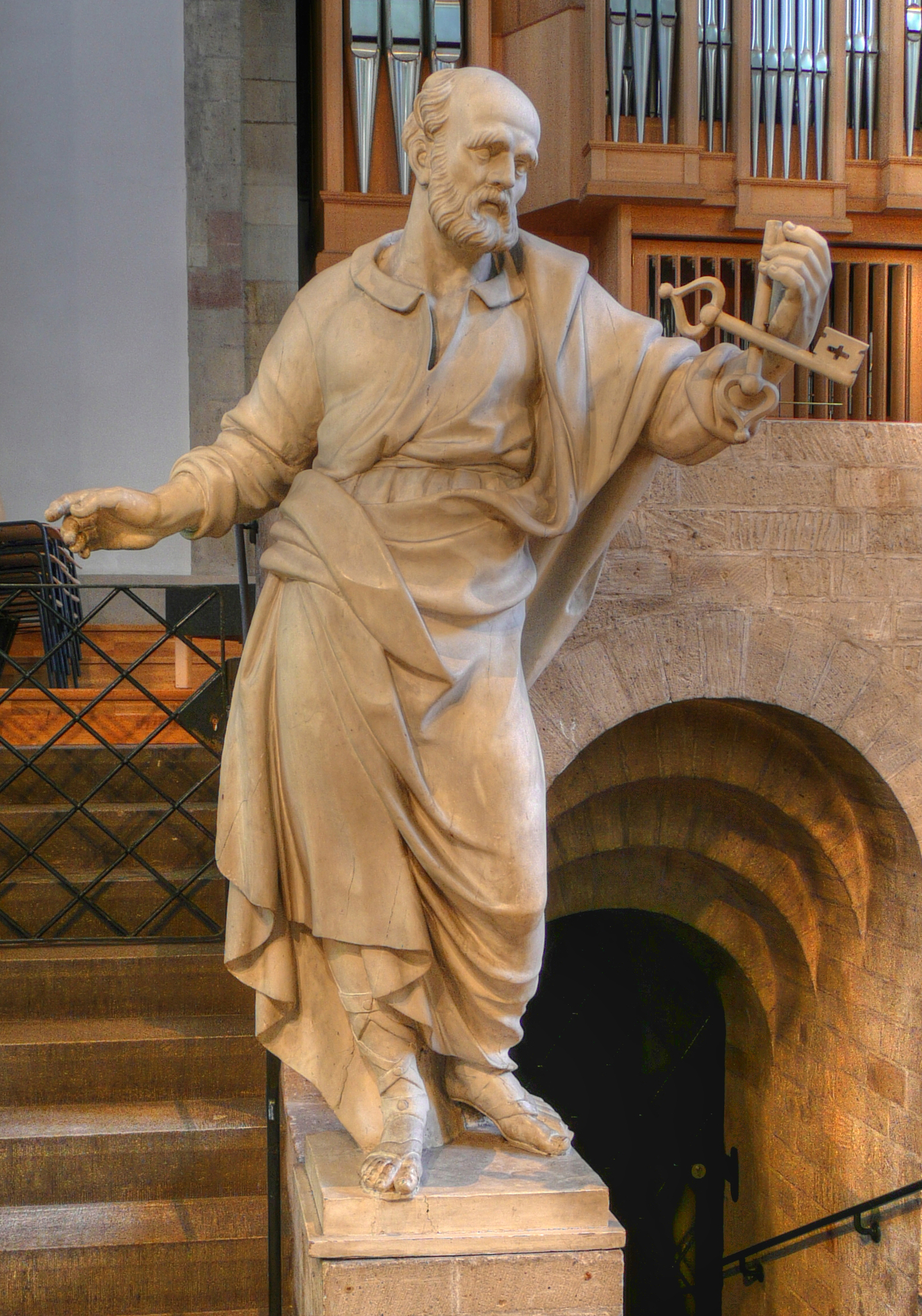 Statue des Apostels Petrus in der Kölner Kirche St. Aposteln)